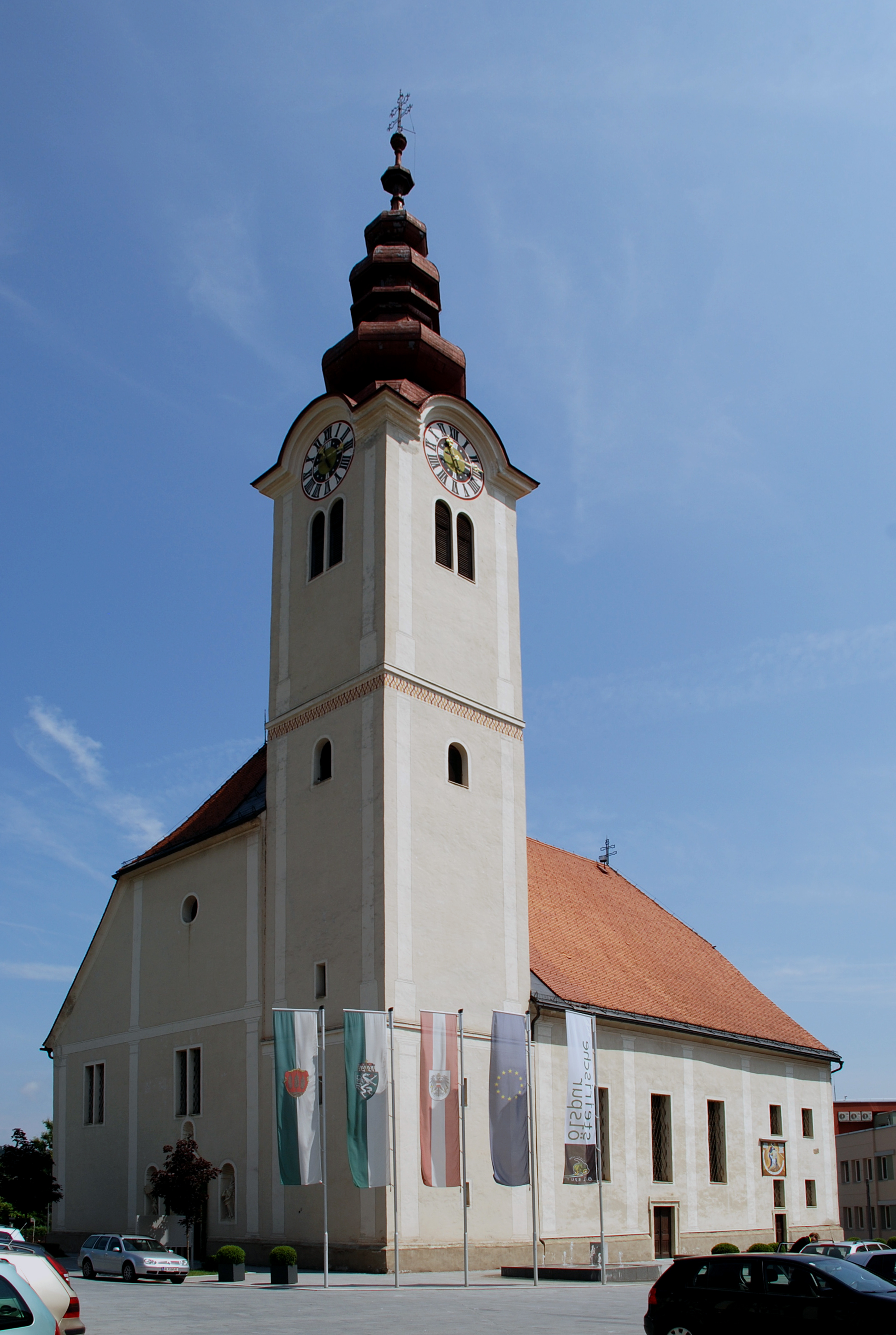 Eibiswald, Steiermark, Österreich: Pfarrkirche